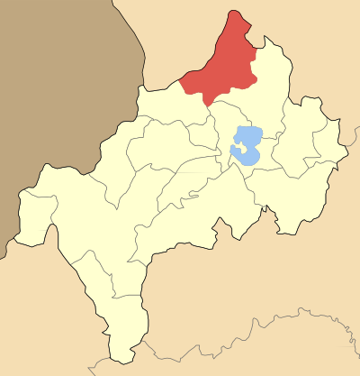 Дем Кореща на картата на Ном Костур, Гърция Locator map of Korestion municipality (Δήμος Κορεστίων) at Kastoria perfecture, Greece).